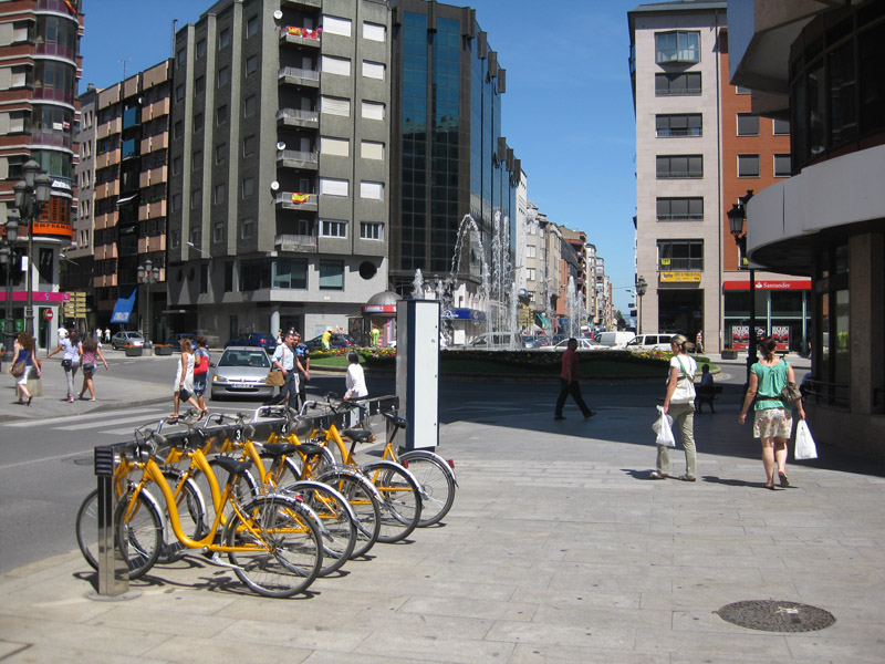 Foto del Puente del Centenario, realizada por Antonin.